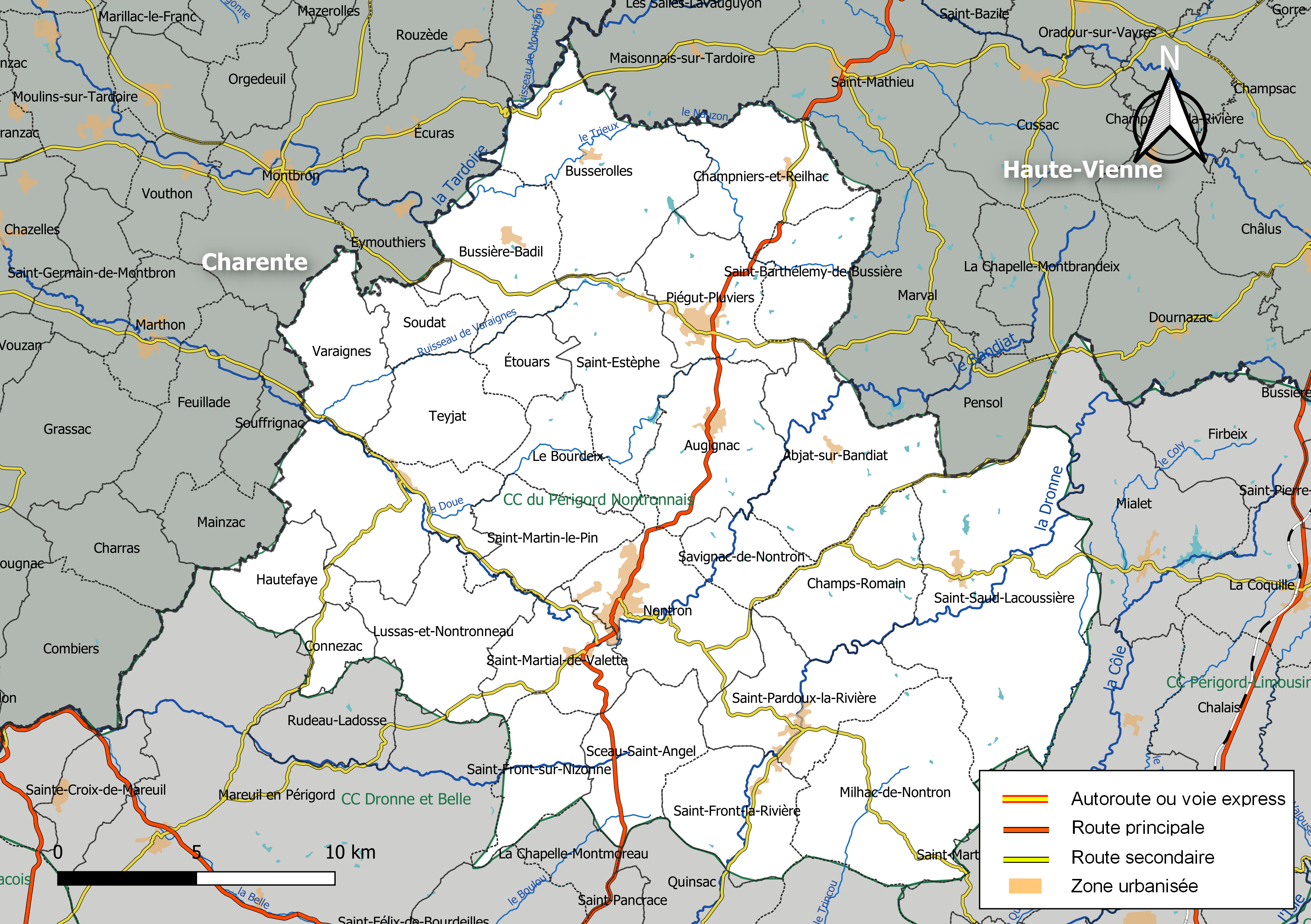 Carte géographique de la Communauté de communes du Périgord Nontronnais (nouvelle), département de la Dordogne, France. Composition au 1er janvier 2019.